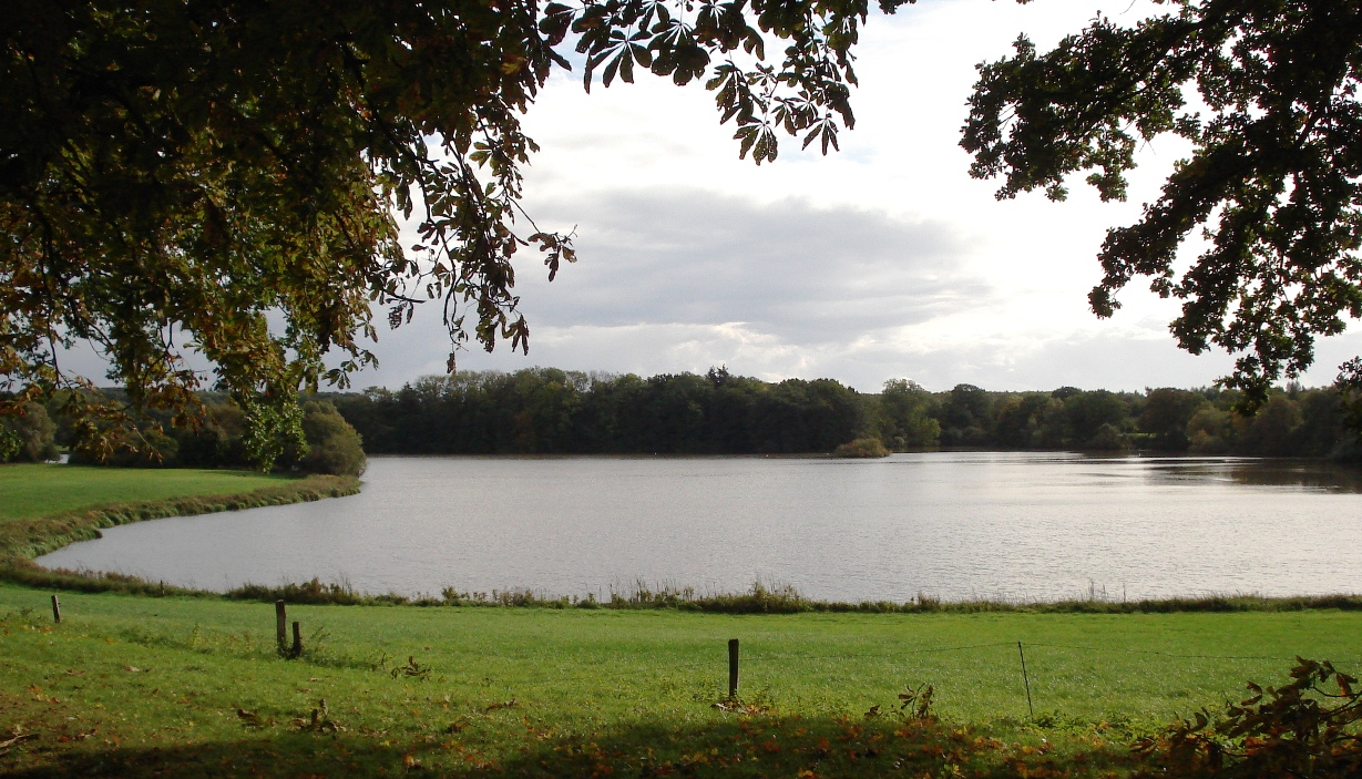 Der Floerkendorfer See in Ahrensboek